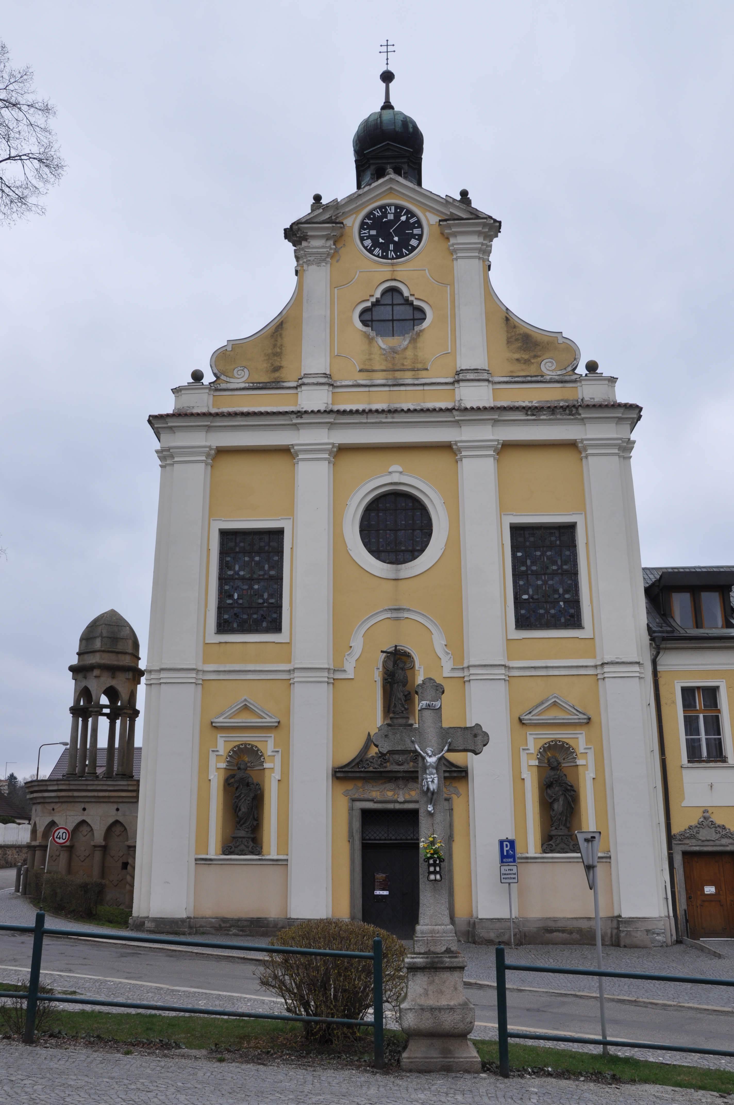 Průčelí klášterního kostela svaté Rodiny. Autorem projektu bratr Philipus - člen konventu pražského kláštera na Zderaze. Zde pracoval až do roku 1691,kdy přešel do německobrodského konventu (kde setrval až do smrti). Dílo bratra Philipuse - vytvoření soch členů sv.Rodiny, které dnes zdobí průčelí kostela. Knižní informace - název knihy Baroko na Havlíčkobrodsku (Publikace vychází k výstavě Baroko na Havlíčkobrodsku 23.května - 7.září 2014) strana 117. Druhá knižní informace - název Havlíčkův Brod a okolí str.35. Autor Jiří Sochr Marie Sochrová - Kostel sv.Rodiny (klášterní) - průčelí upraveno podle návrhu br.Filipa a Sancto Hermanno. Knihy k zapůjčení v Krajské knihovně Havlíčkův Brod. Informace nastudoval Pohled 111. Klášterní kostel svaté Rodiny. Ulice P.F. Ledvinky a ulice B. Kobzinové. Havlíčkův Brod. Kraj Vysočina. Czech Republic.